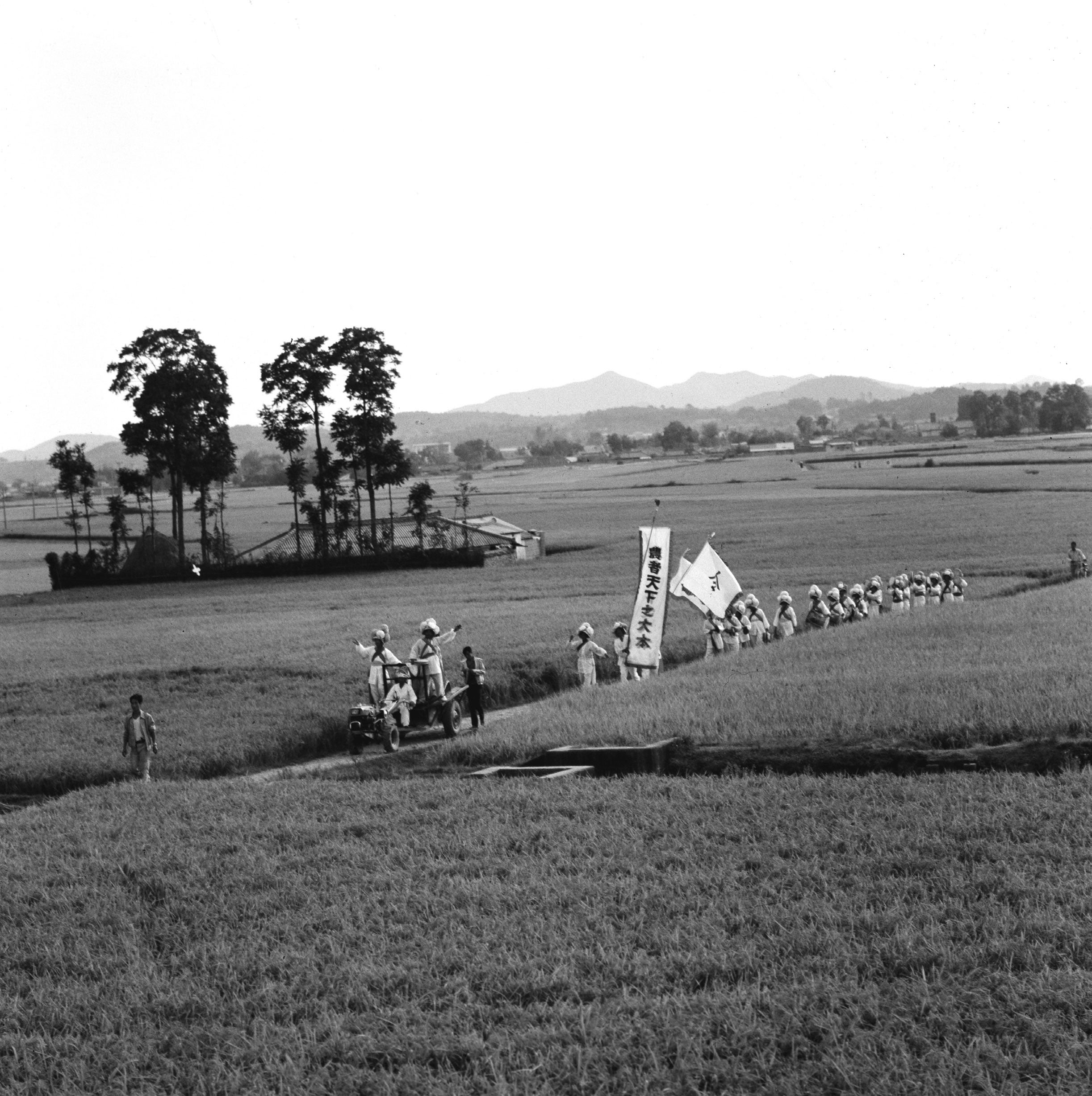 촬영일 : 1976년 10월 05일 촬영장소 : 대한민국 나주평야 참석자 : 농악대 인물상세정보 : 농악대(전체) 관련내용 : 농악대가 지나가고 있는 추수기의 나주평야